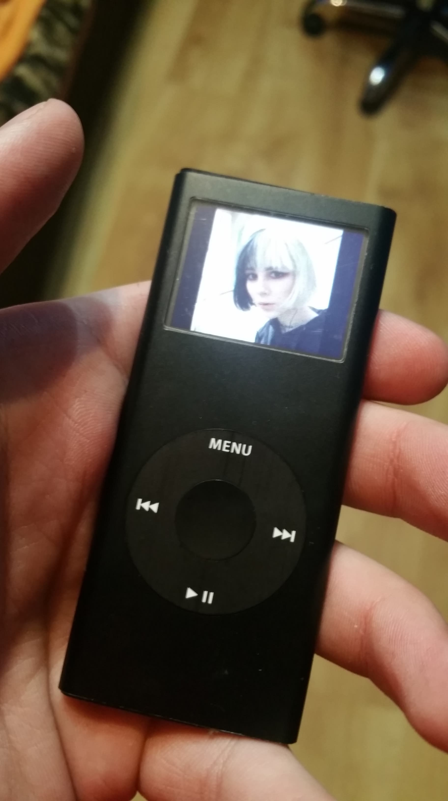 iPod nano drugiej generacji z systemem w wersji 1.1.3.